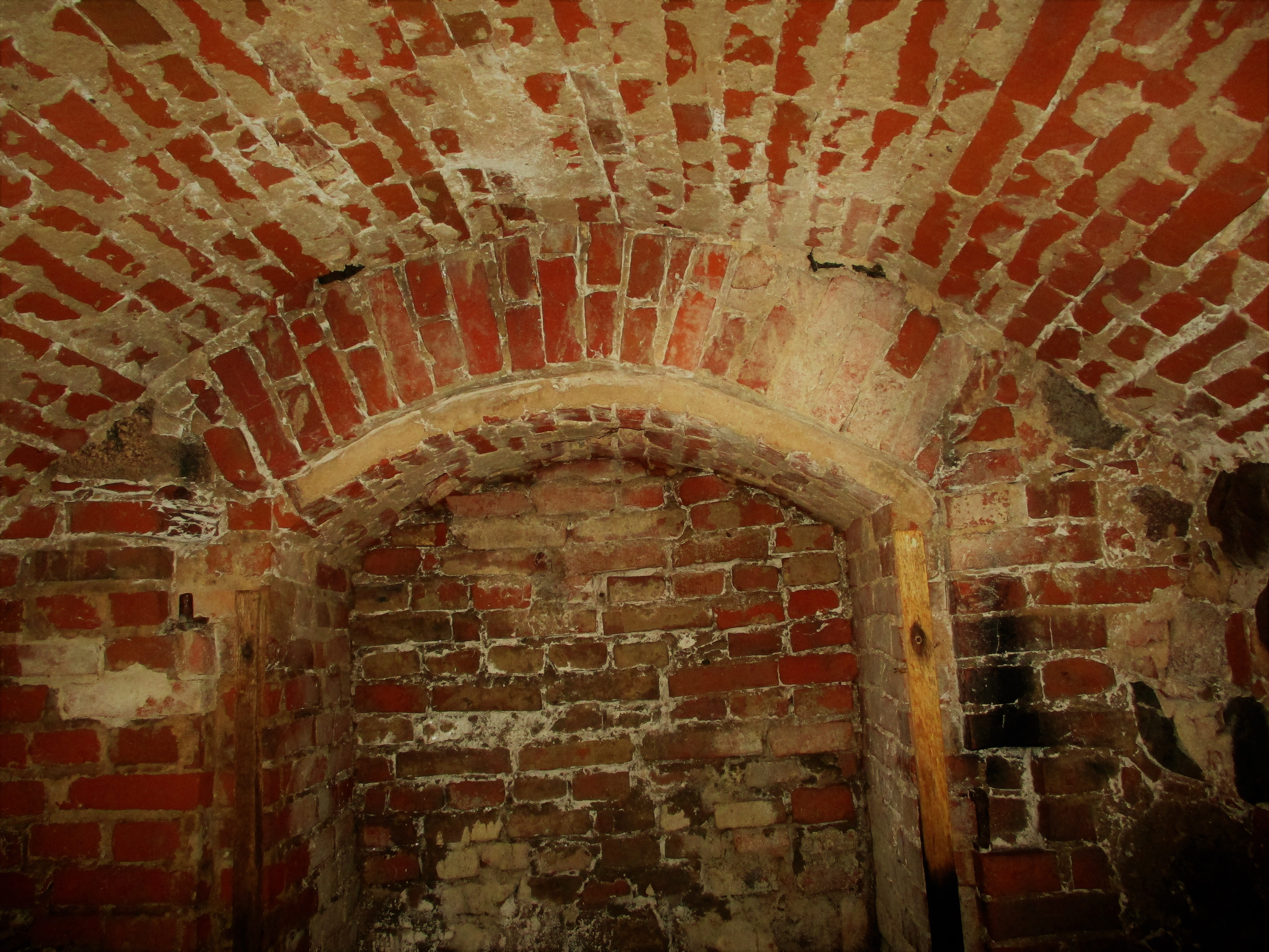 Vaade mõisa peahoone keldri keskpaigas loodeseinas asuvale kinnimüüritud ukseavale.